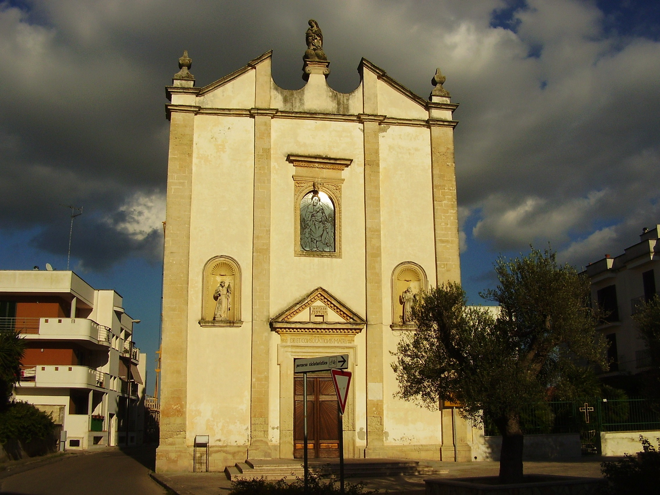 Chiesa della Consolazione Lequile, Lecce